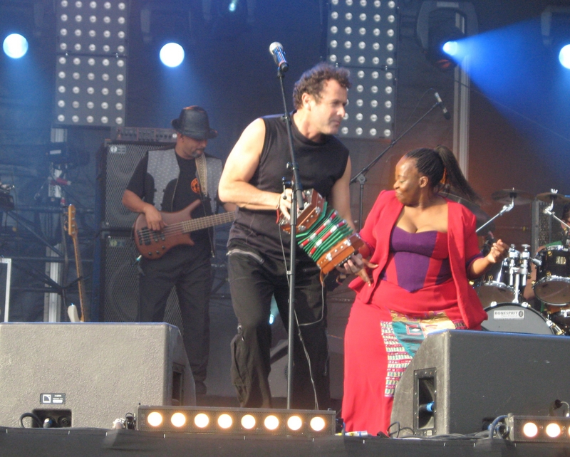 Johnny Clegg (avec Mandisa Dlanga) à la Fête de l'Humanité le 14 septembre 2007